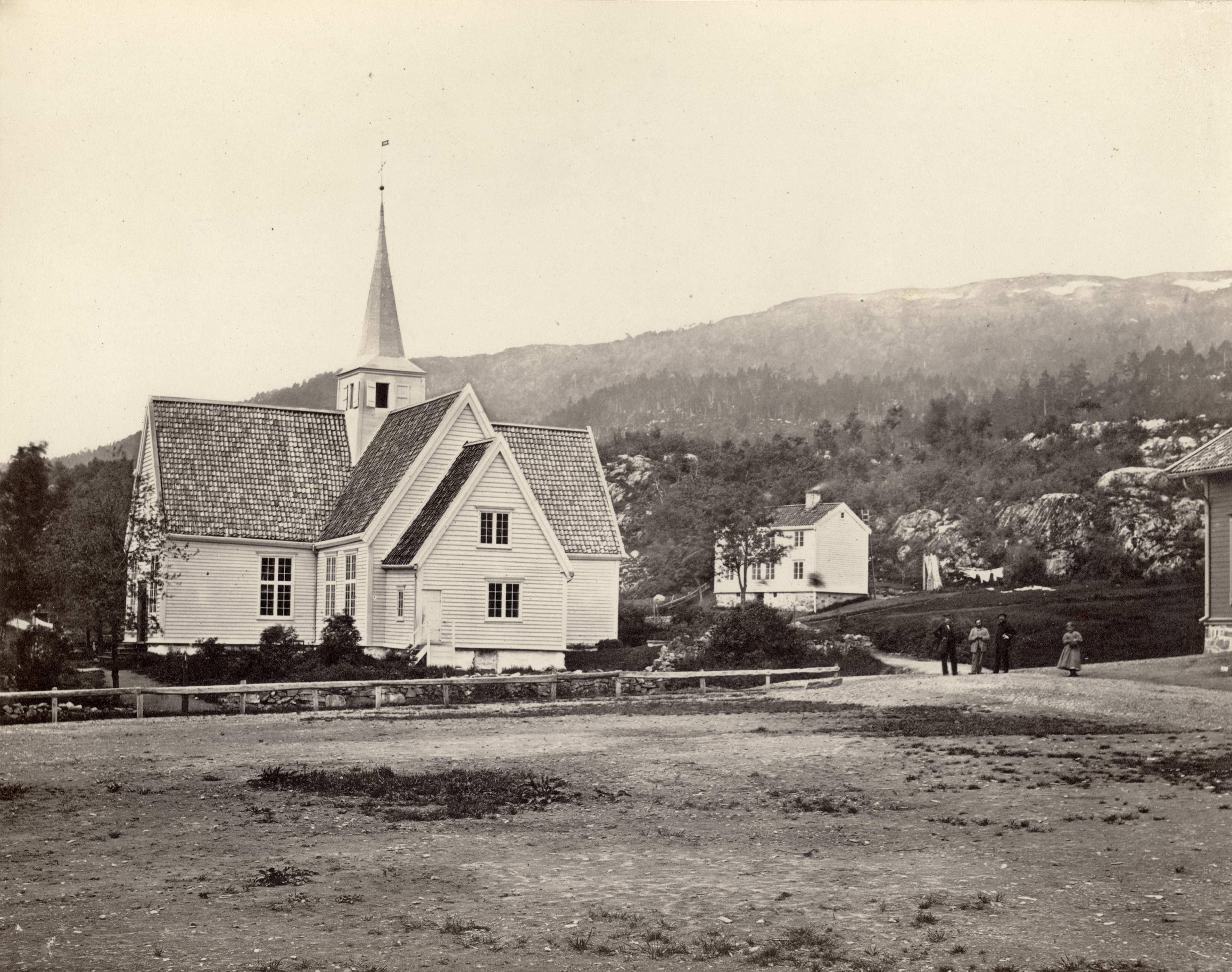 Molde kirke i Molde, Møre og Romsdal 1661-1885. This image on crowdsourcing geotagging platform Fotodugnad